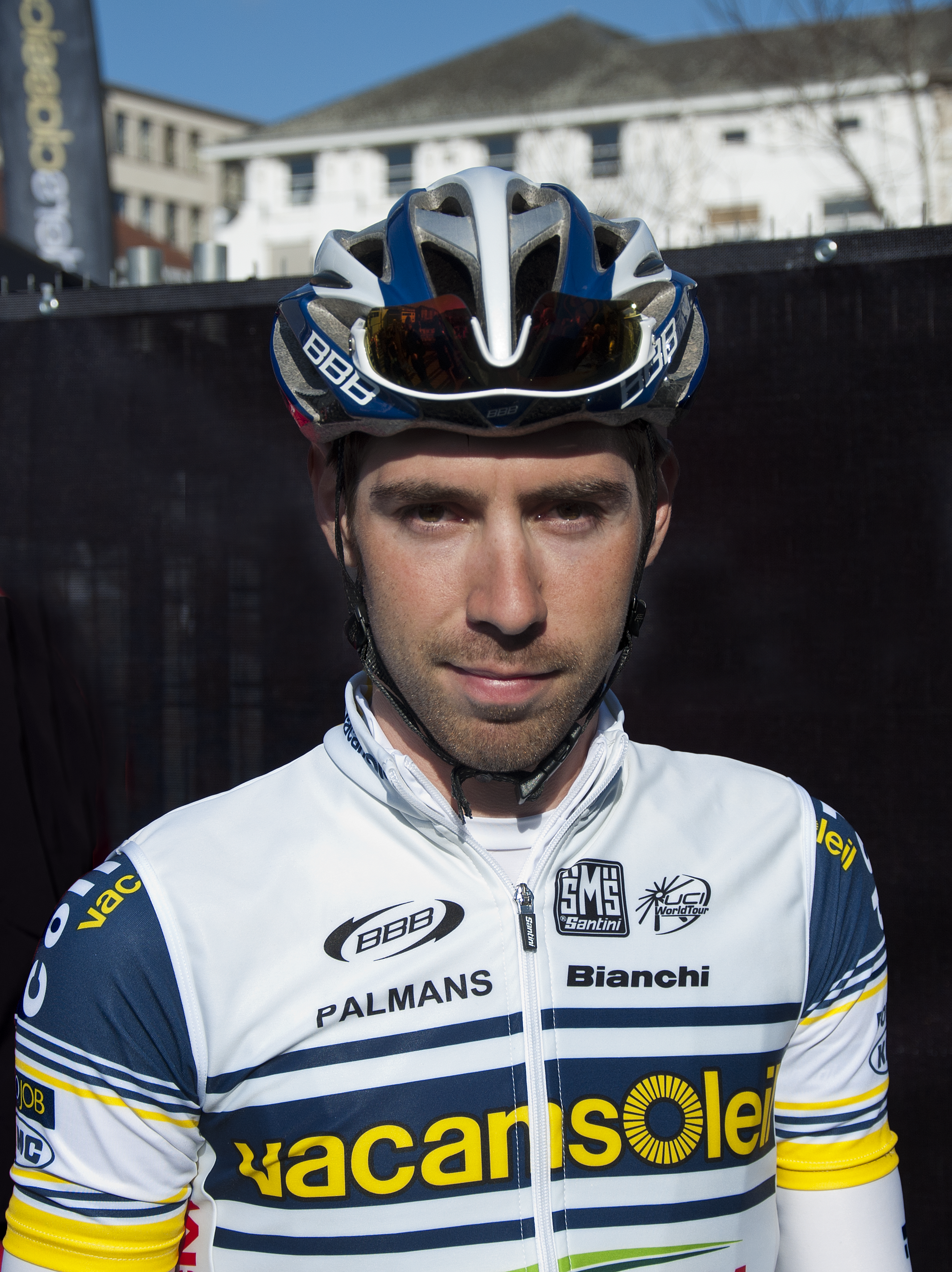 Thomas De Gendt bij de start van de Omloop Het Nieuwsblad 2012 te Gent